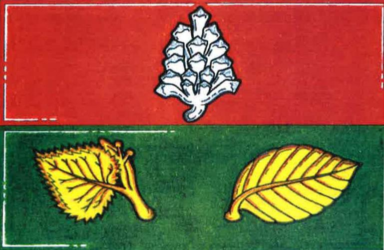 Záboří (CB), vlajka. List tvoří dva vodorovné pruhy, červený a zelený. V červeném vztyčená bílá borová šiška, v zeleném dva odvrácené žluté listy, lipový s listenem o dvou plodech a bukový. Poměr šířky k délce listu je 2 : 3.